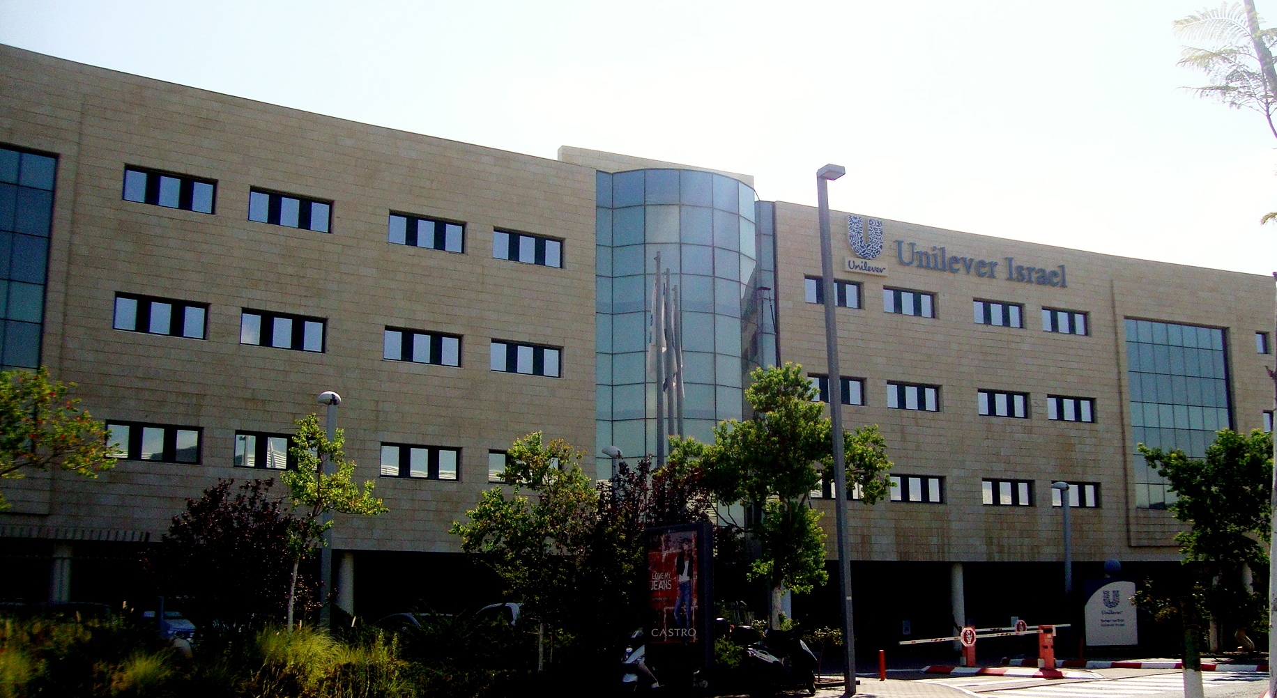 מטה יוניליוור ישראל, קריית שדה התעופה, לוד